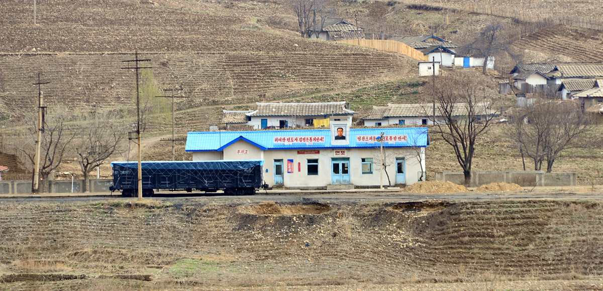 惠山满浦青年铁路 莲浦站 連浦駅 련포역 RyonpoPukpu Line (Hyesan Manpho Chongnyon Line)